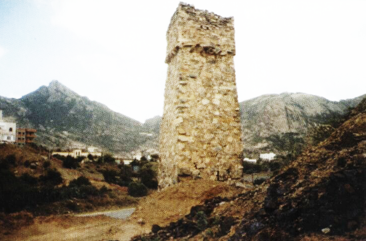 حصون بلاد قبيلة حوالة